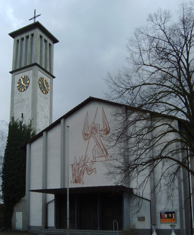 Deutschland: Katholische St.-Michael-Kirche im Ortsteil Rohrhof von Brühl (Baden)